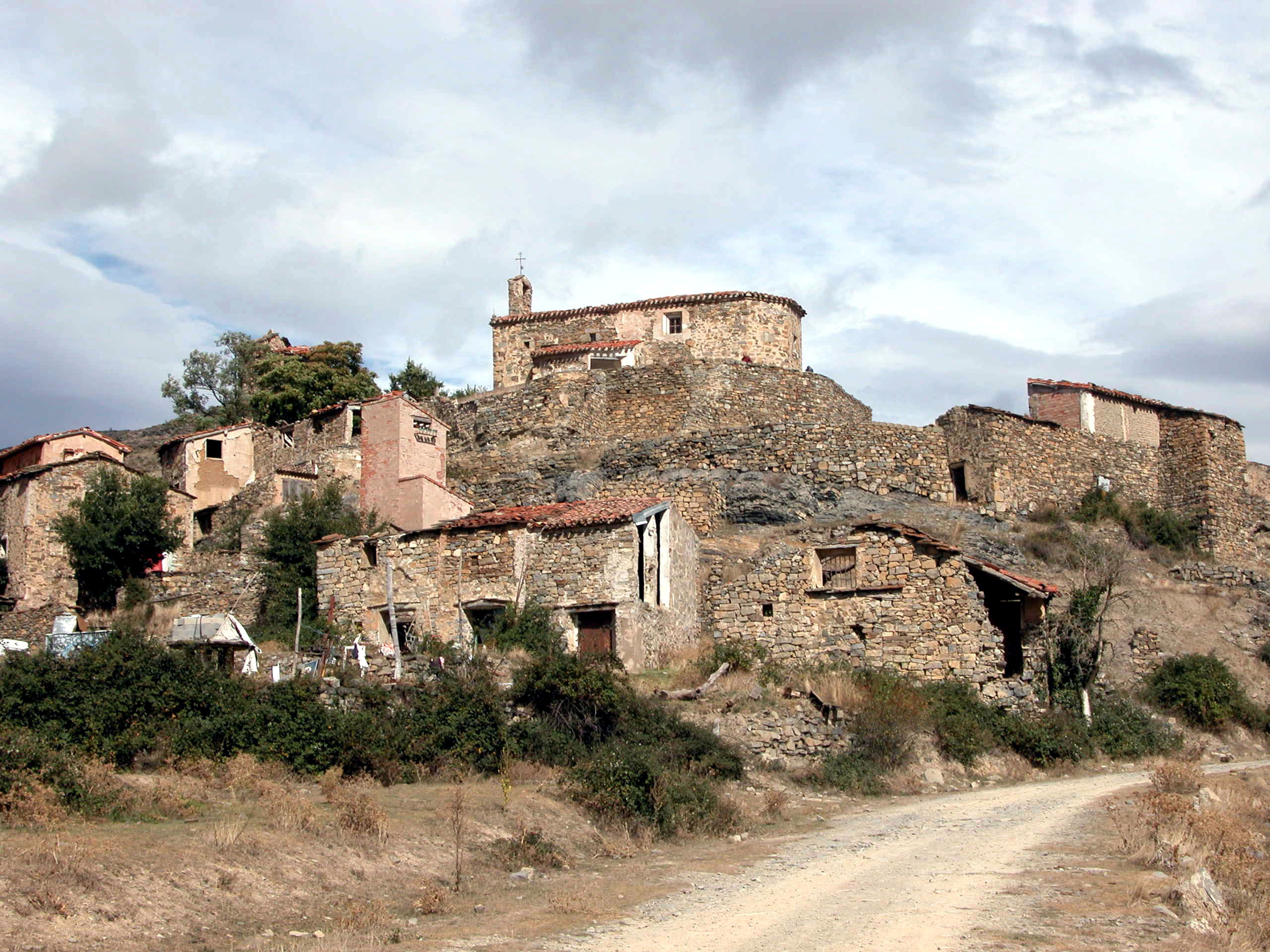 San Vicente de Munilla, despoblado de Munilla, La Rioja - España.